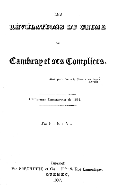 Frontpage of the book Révélations du crime ou Cambray et ses complices. Québec : Fréchette et cie, 1837, by François Réal Angers